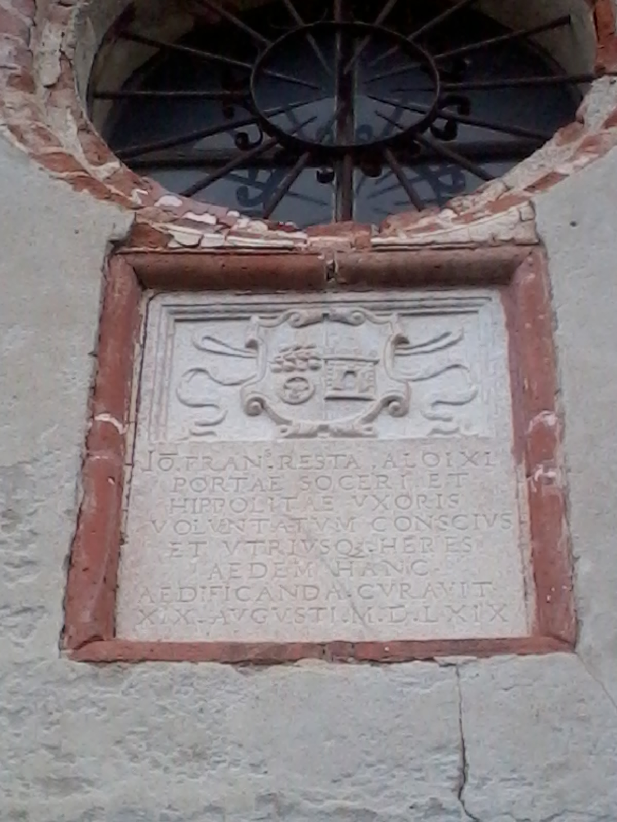 Targa commemorativa dell'erezione dell'Oratorio di San Bernardino presso la Cascina Scanna, Cisliano (MI) - Italy